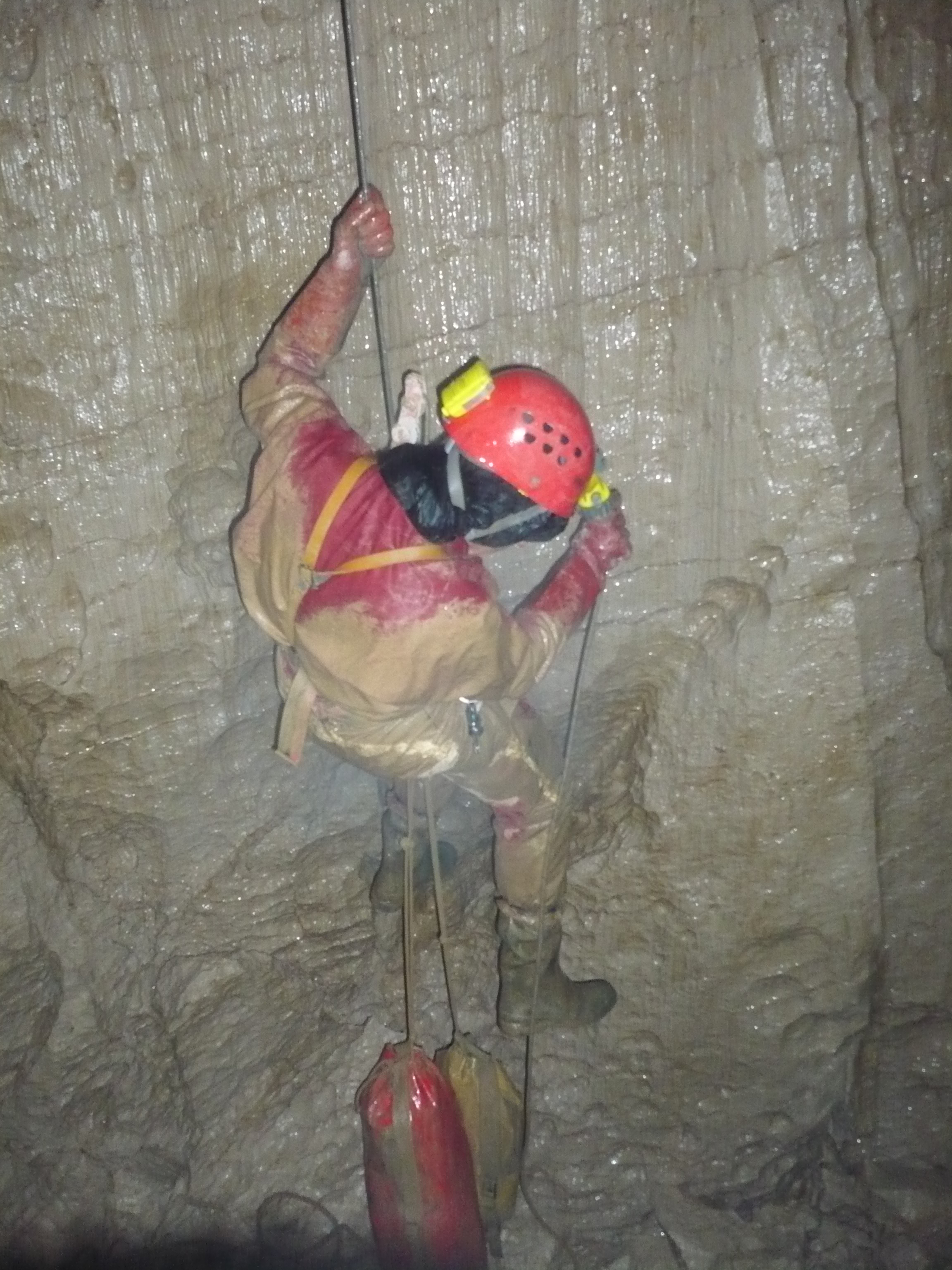 On descend 500 mètres de puits pour rejoindre la grotte Chevalier.